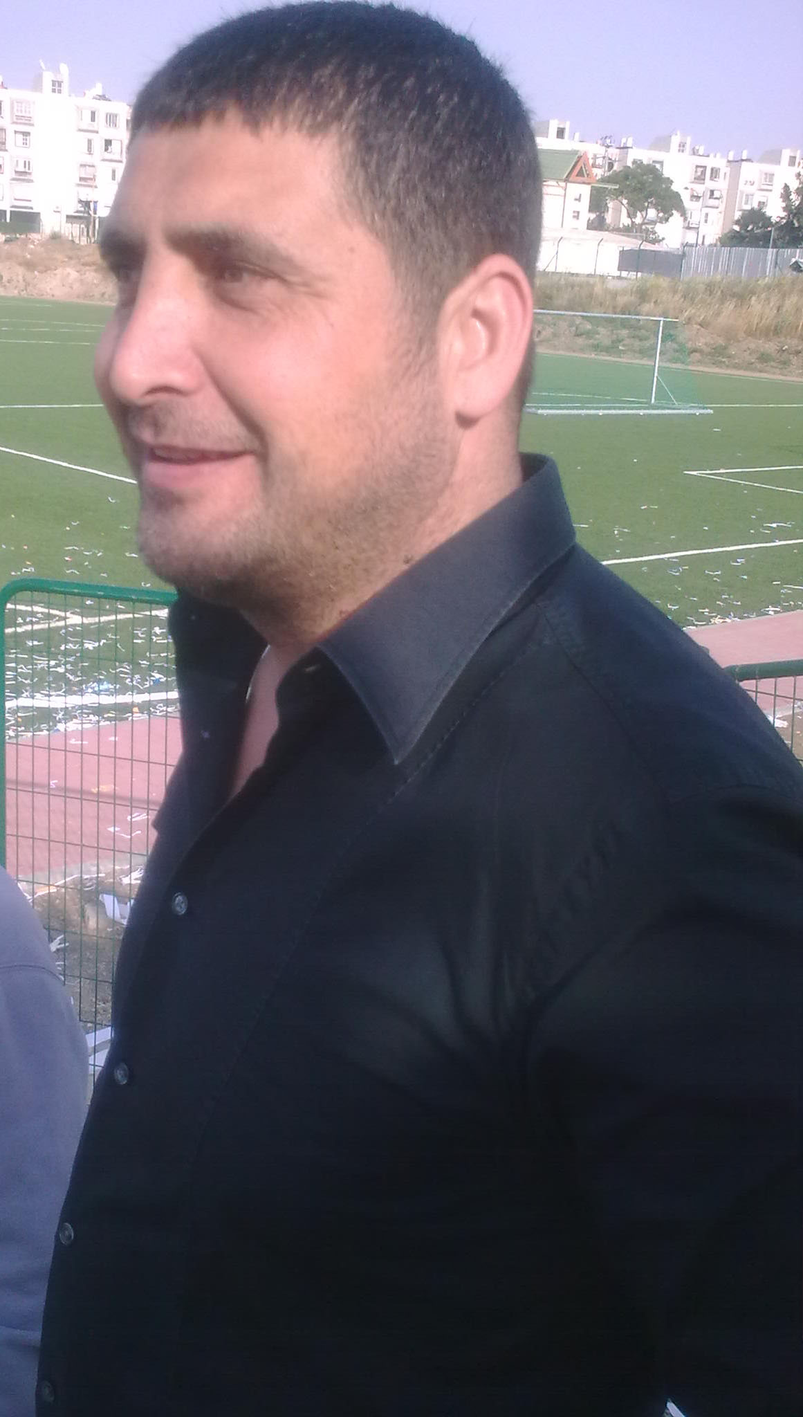 Yuval Naim